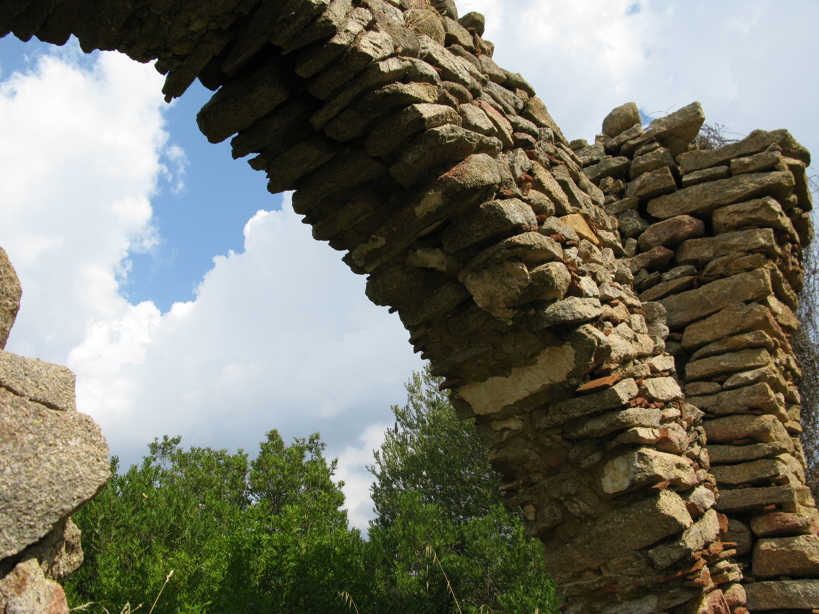 I Ruderi di Sa Itria, Nuoro